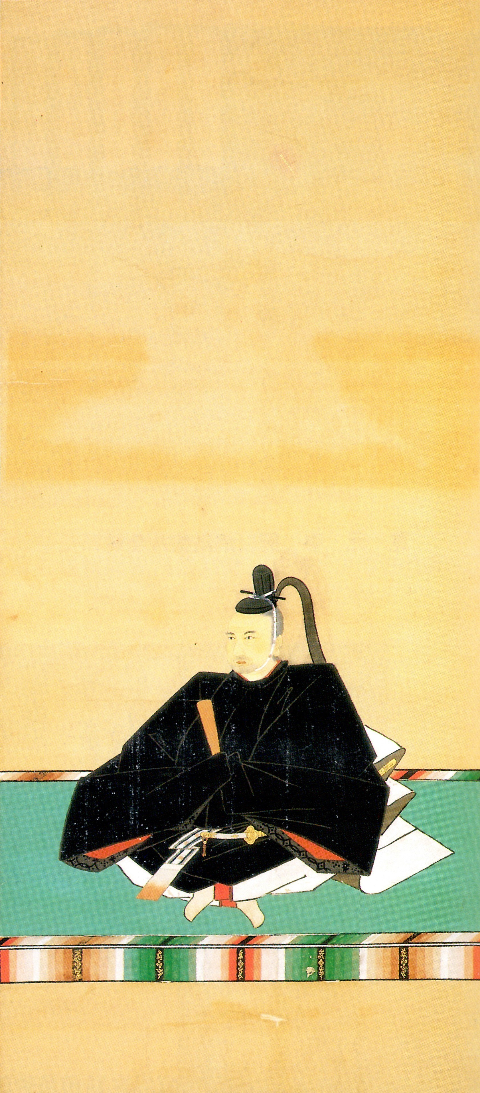 鍋島光茂の肖像。